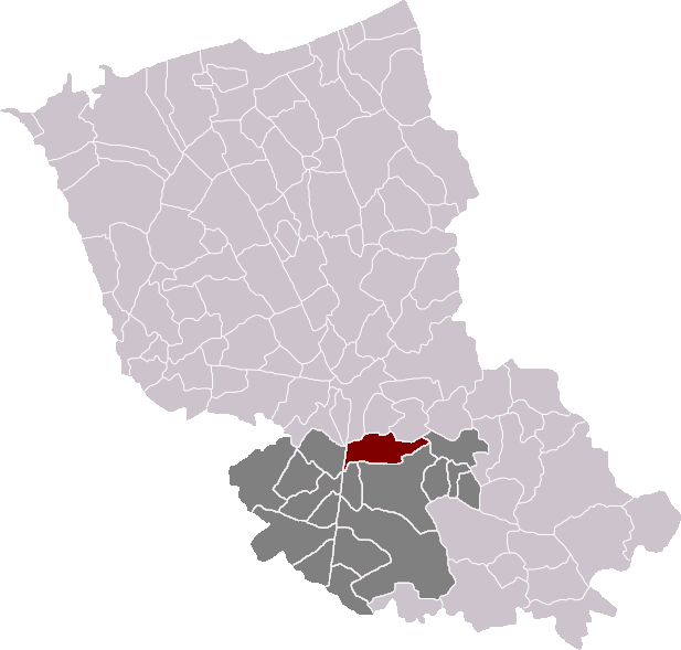 Locatie gemeente Hondegem in arrondissement Duinkerke. Zelfgemaakt. Location of Hondeghem municipality in the arrondissement of Dunkirk. Self made. Localisation de la commune d'Hondeghem dans l'arrondissement de Dunkerque. Fait moi-même.